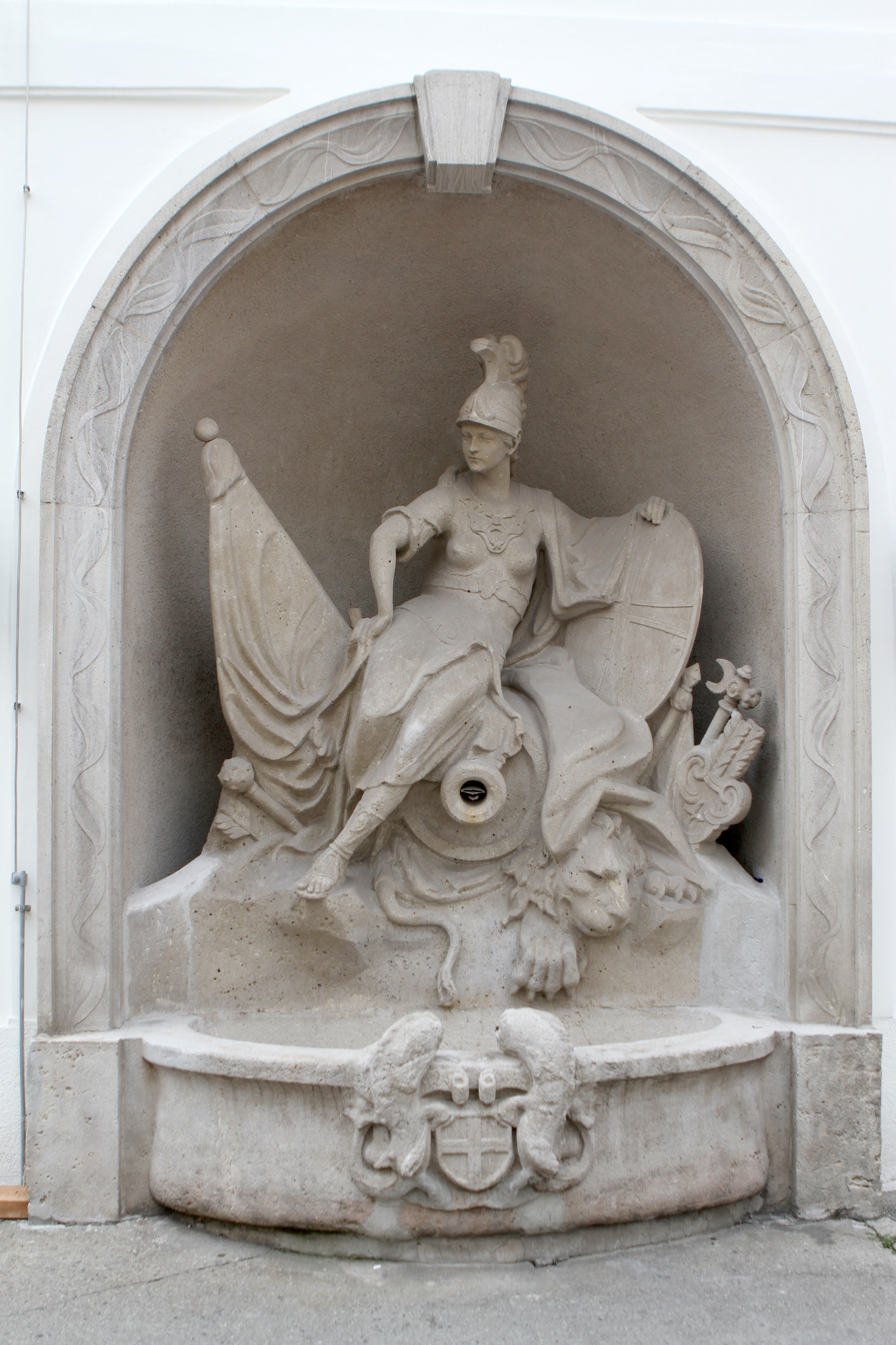 Ehem. Bürgerliches Zeughaus, Feuerwehrzentrale, Brunnen im Innenhof, Am Hof 10